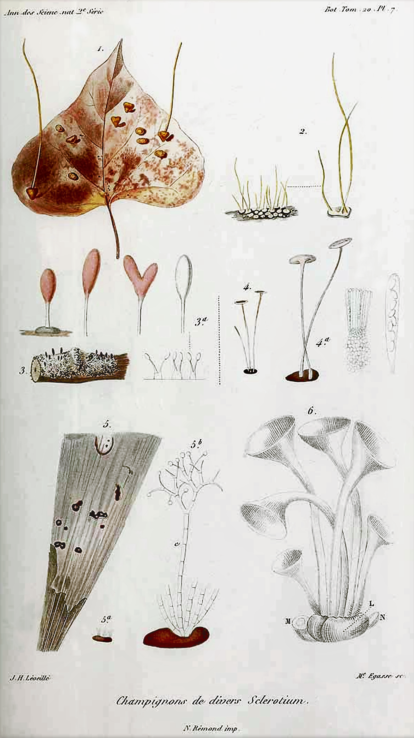 Verschiedene Arten von Sclerotium